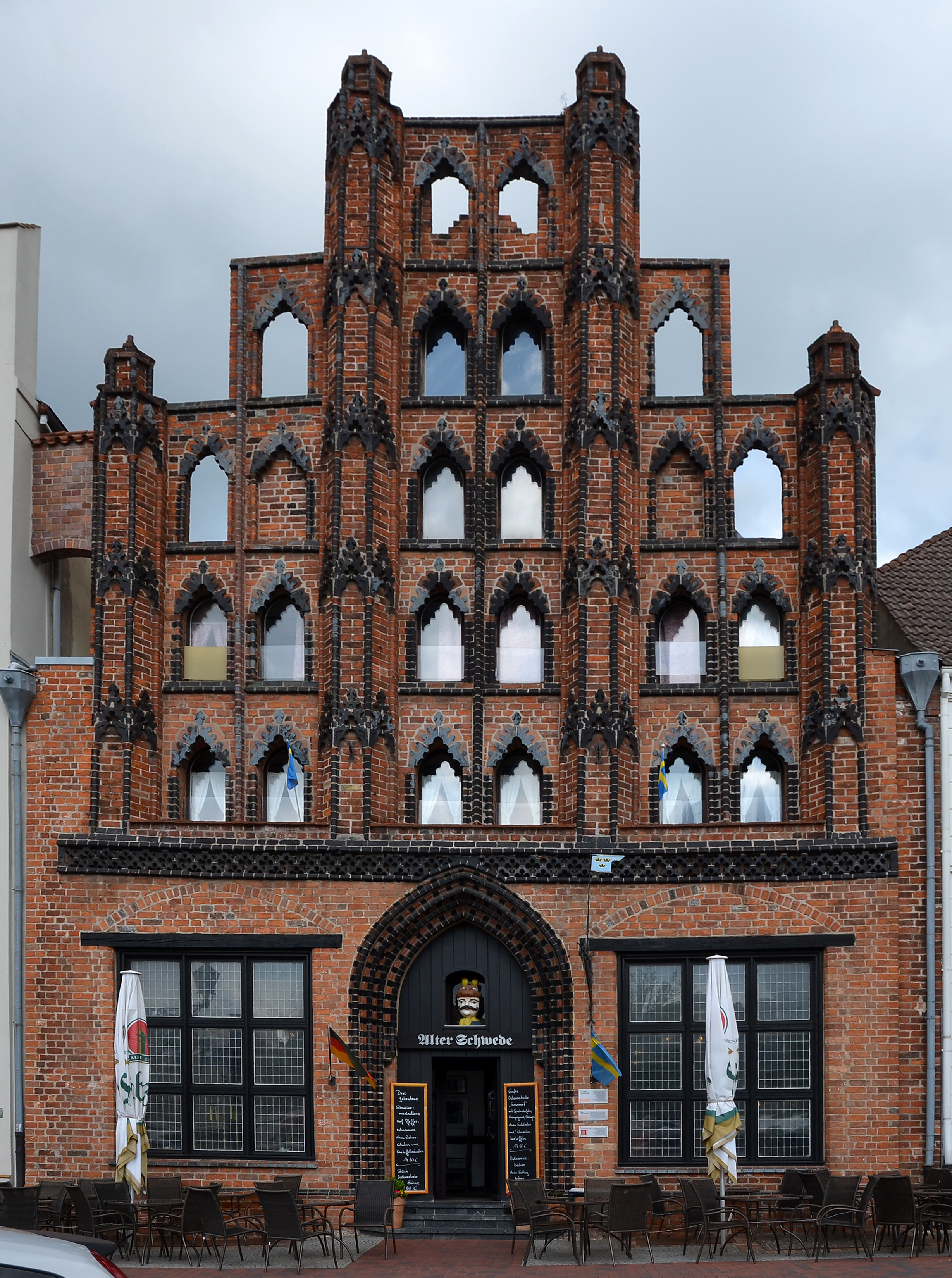 Alter Schwede, Gaststätte, Am Markt 22/21, Wismar, Landkreis Nordwestmecklenburg, Deutschland